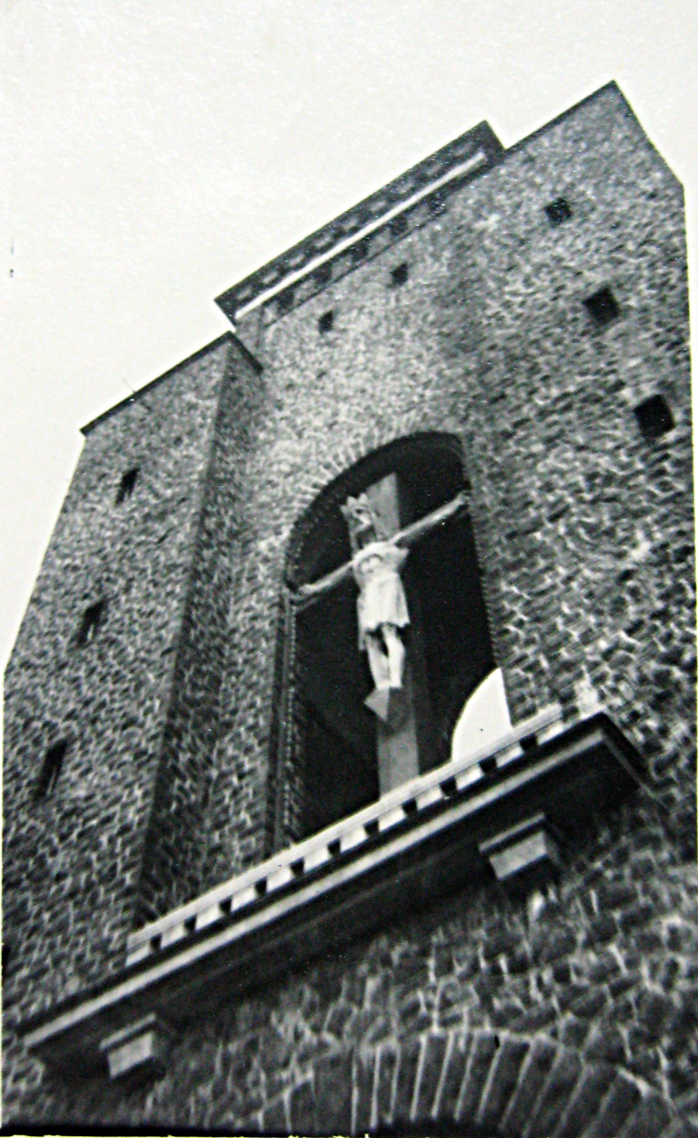 Alter Schaumbergturm. Beim Abriss des alten Turms weigerten sich die polnischen Bauarbeiter das Kreuz abzureißen. Daraufhin wurde das Kreuz abgebaut und gut sichtbar an der Autobahn A1 bei Tohley wieder errichtet.